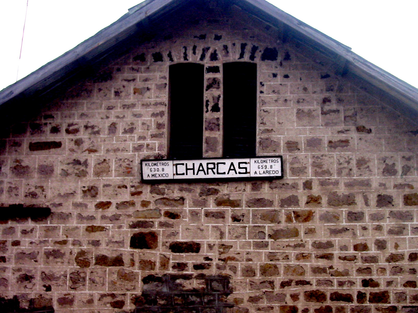 Estación de Tren Charcas, San Luis Potosí/ Charcas Train Station, San Luis Potosí